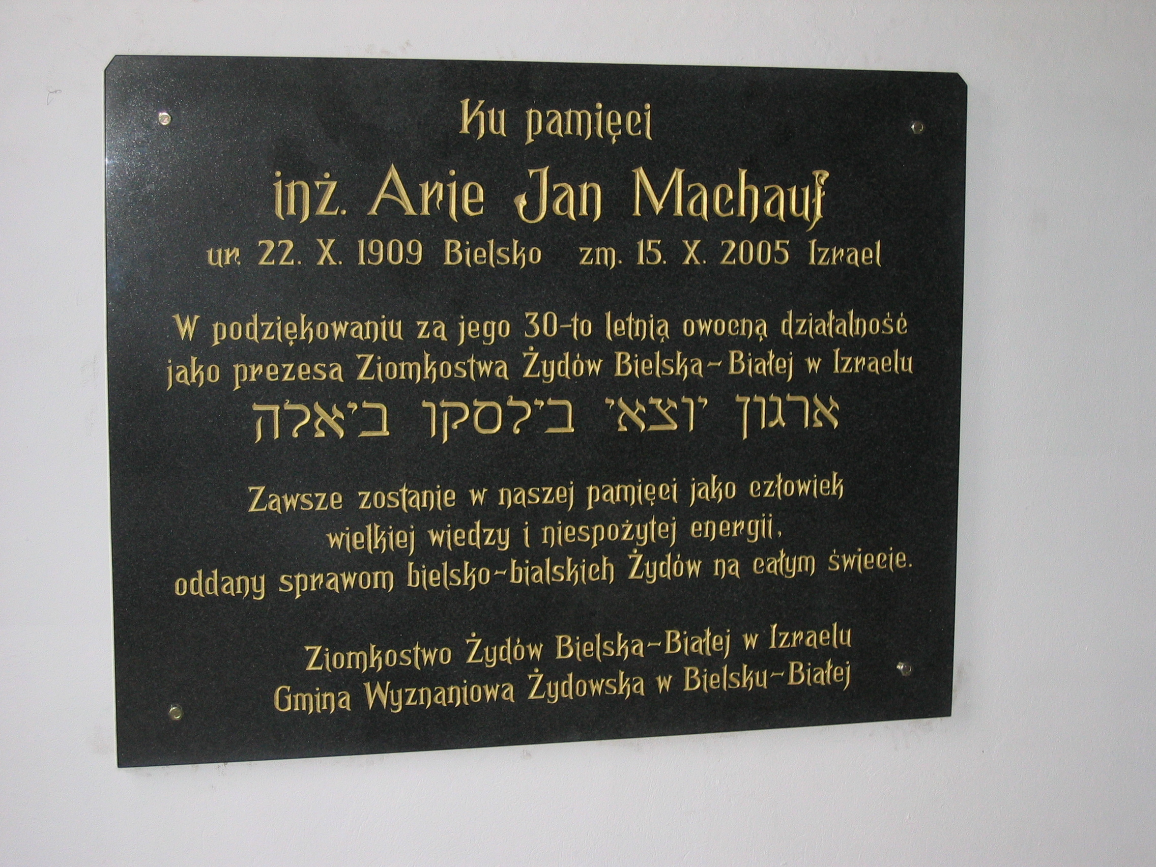 Tablica ku czci Arie Jana Machaufa w domu przedpogrzebowym na cmentarzu żydowskim w Bielsku-Białej